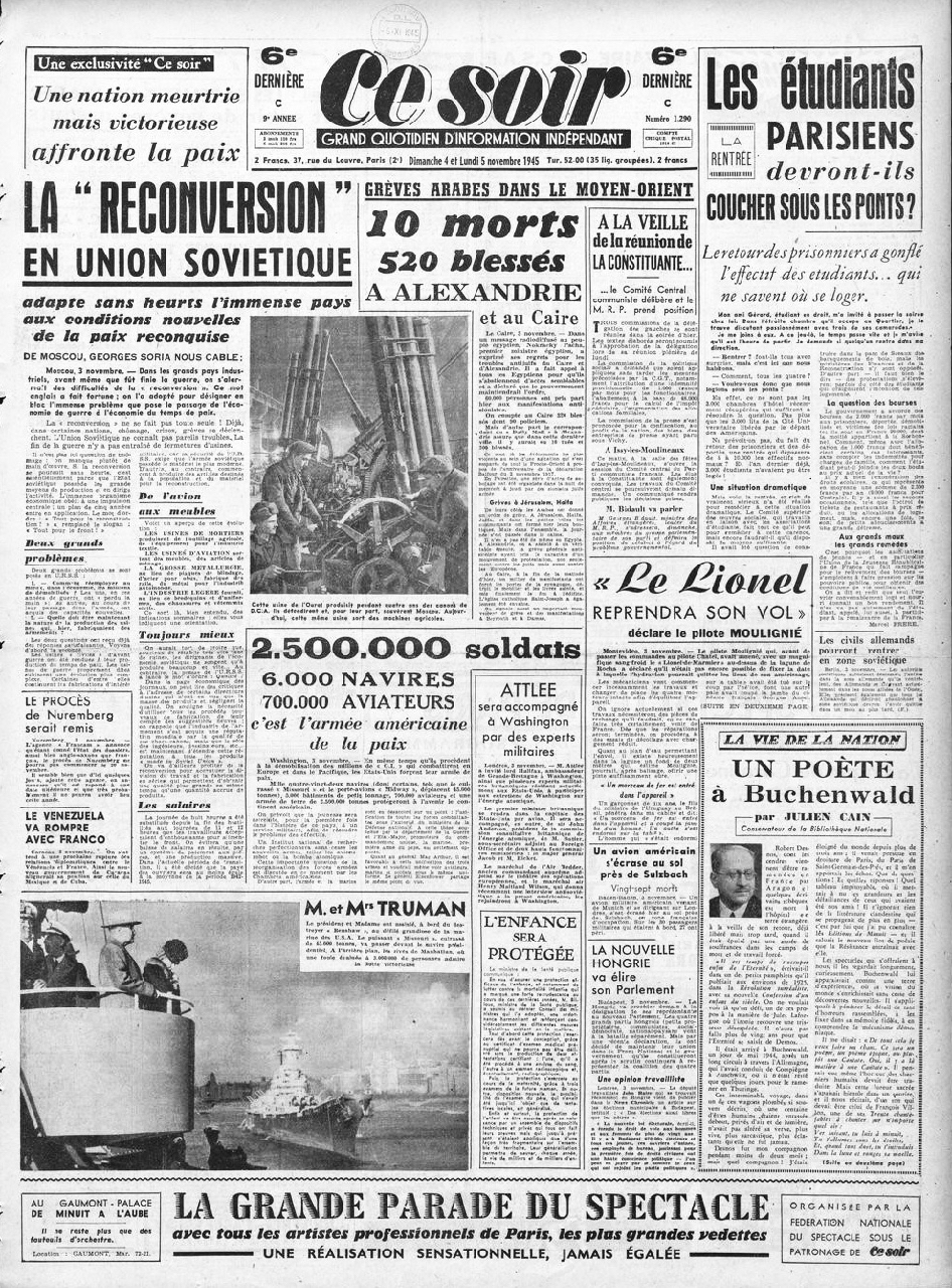 "Ce soir ": grand quotidien d'information indépendant / directeur Louis Aragon ; directeur Jean Richard Bloch, 4 et 5 novembre 1945.